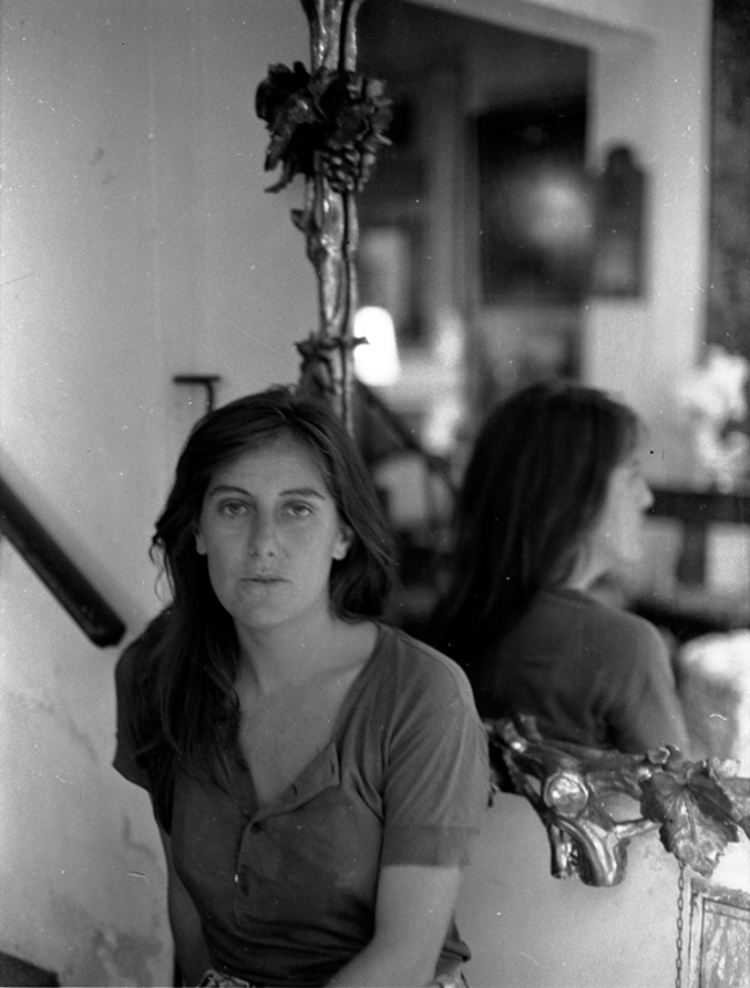 Autorretrato